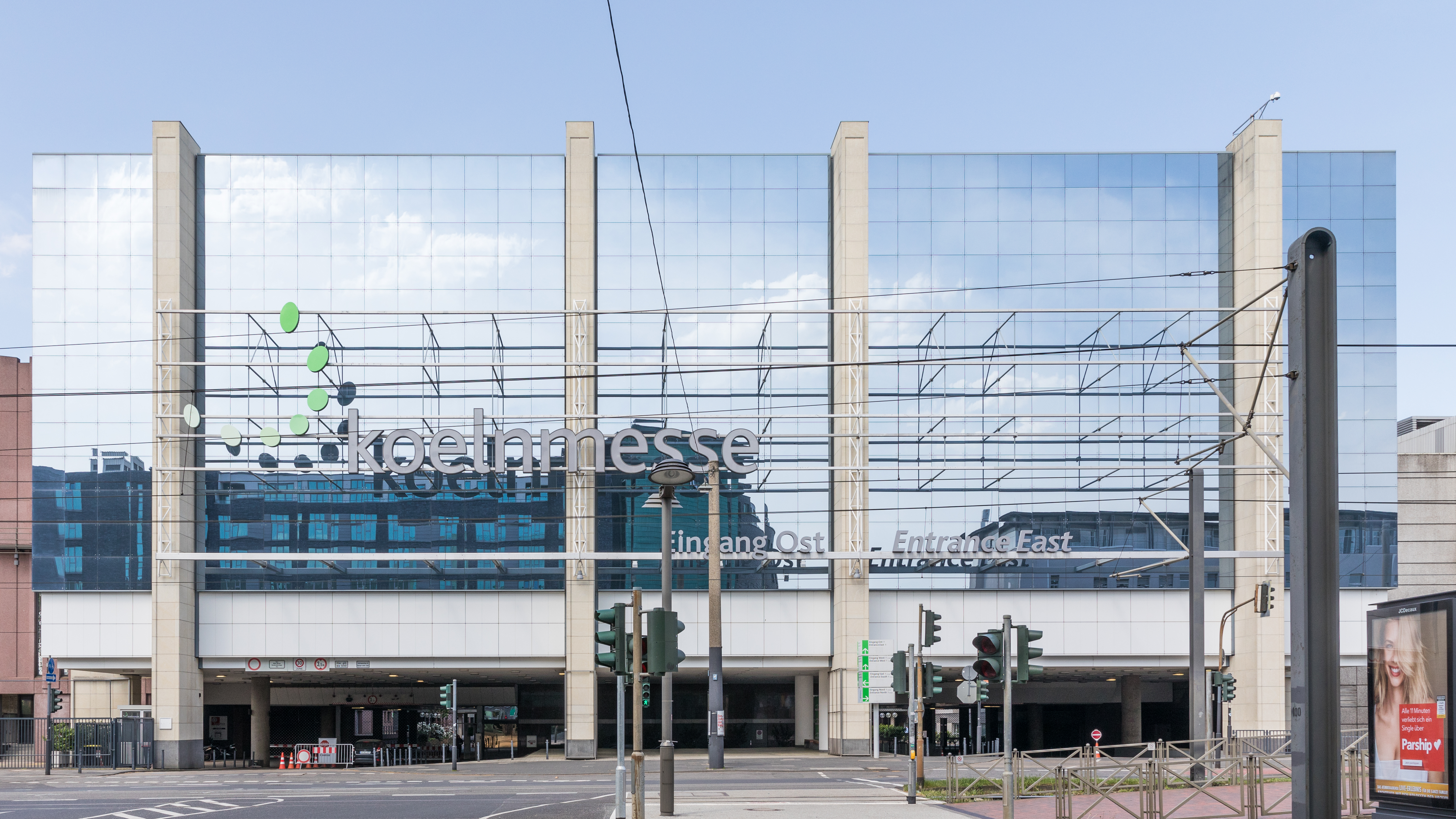 Koelnmesse, Eingang Ost. Im Vordergrund die Deutz-Mülheimer Straße